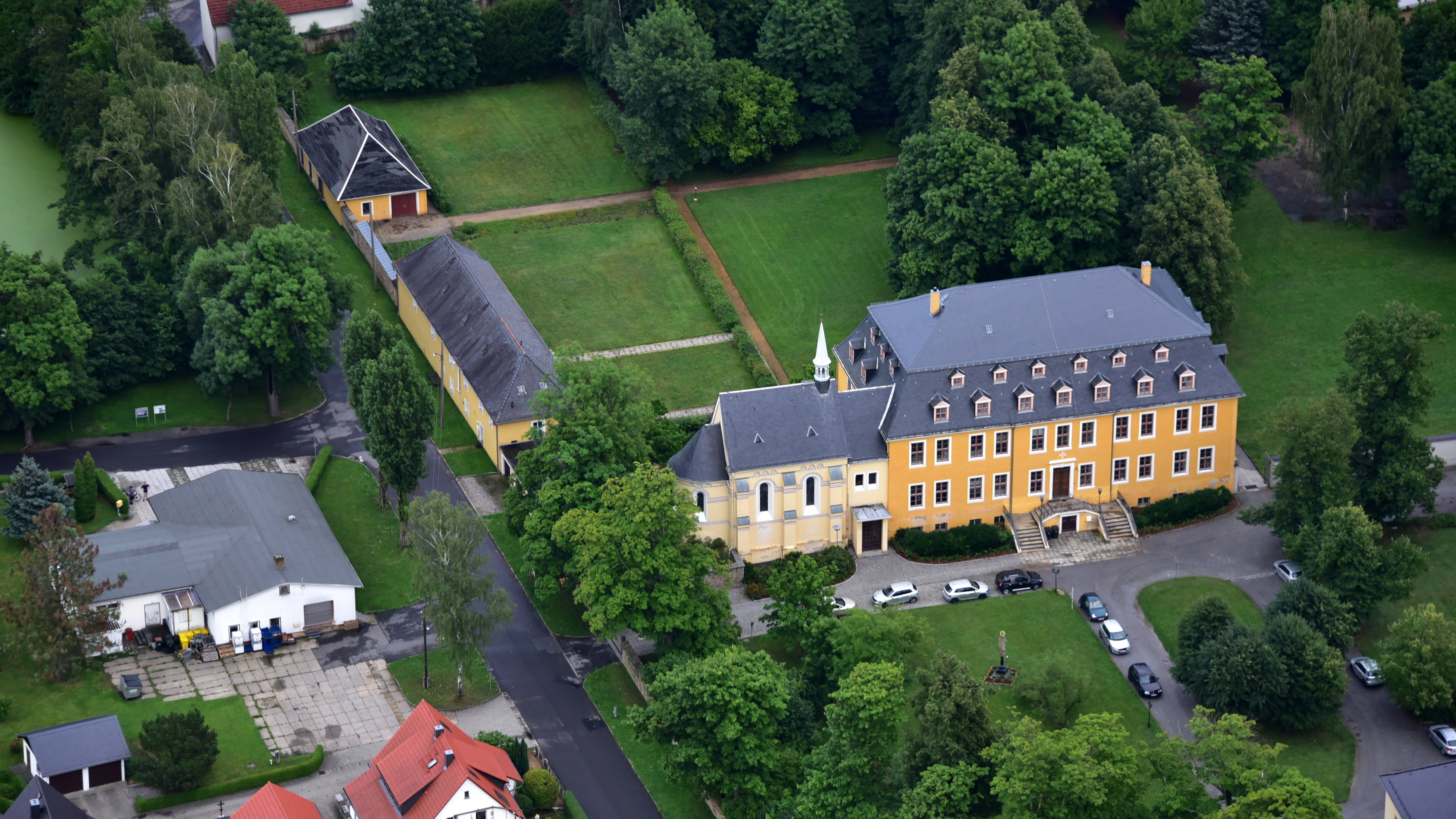 Schloss Räckelwitz, Luftaufnahme (2017) Hornjoserbsce: Powětrowy wobraz Worklečanskeho hrodu (2017)